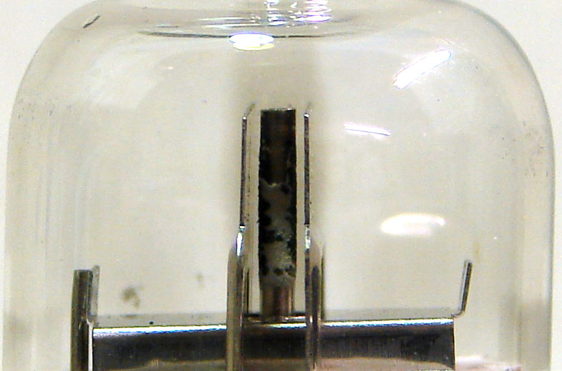 Makroaufnahme des Diodenteiles einer Röhre EBC91 mit teilweise abgelöster Kathodenschicht.